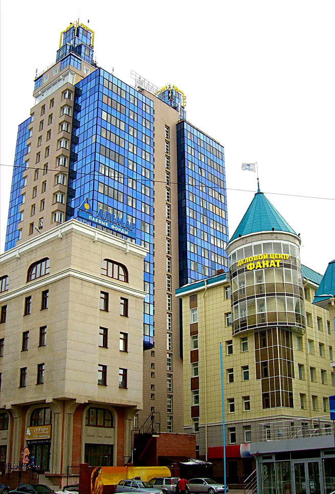 Новосибирск. Один из самых высоких жилых домов в городе